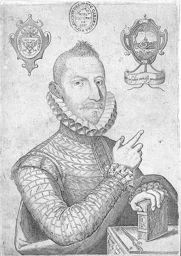 Retrato de Mateo Alemán (1547-1615). Grabado en cobre aparecido en la edición príncipe del Guzmán de Alfarache (Madrid, Várez de Castro, 1599). Apoya la mano izquierda sobre un libro cerrado, en cuyo corte dice: "Cor. Ta." (Cornelius Tácitus). Con la derecha señala la linda cartela que hay en uno de los ángulos superiores de la estampa con el emblema de la araña sobre el áspid, y la letra: "Ab insidiis non est prudentia". Haciendo juego con esta cartela, está en el otro ángulo el escudo de armas.